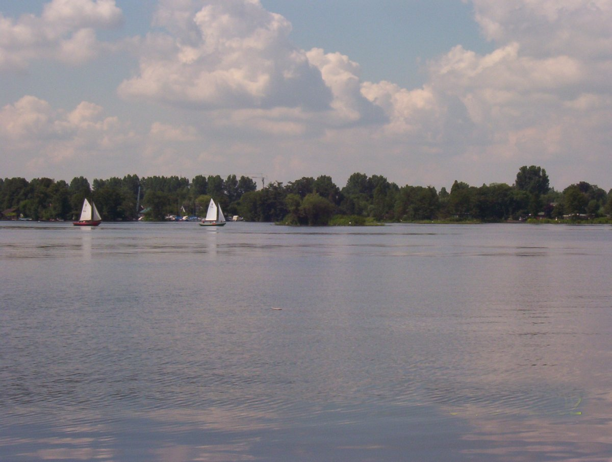 Elfhoevenplas Reeuwijk, eigen foto, gebruik vrij